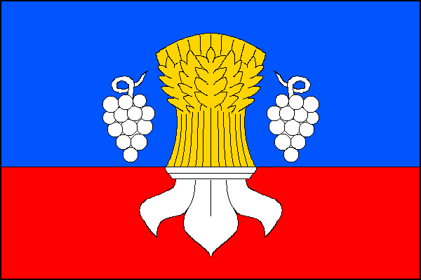 vlajka obce Sušice, okres Uherské Hradiště District